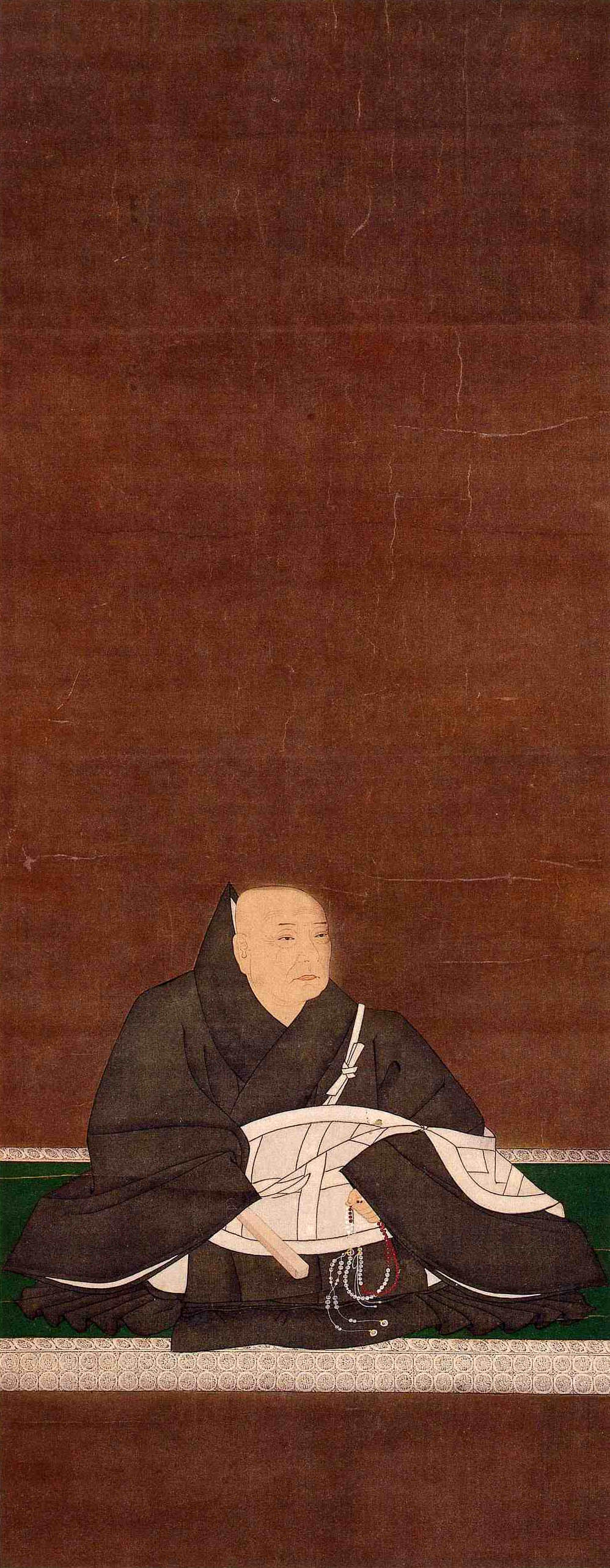 蓮如影像